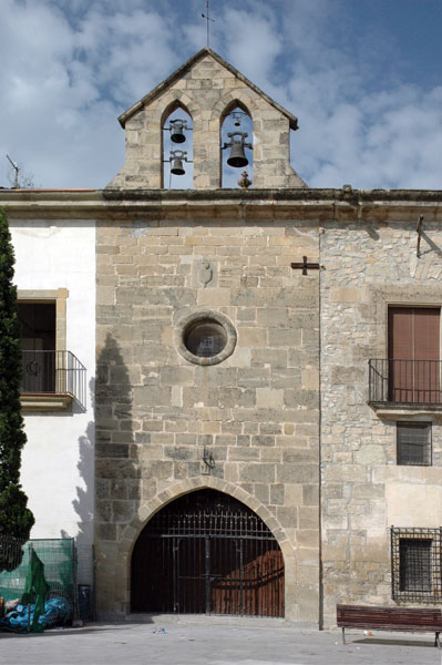 Santa Coloma de Queralt (Conca de Barberà). Capella del Sant Crist de l’antic Hospital, ara remuntada al costat del castell